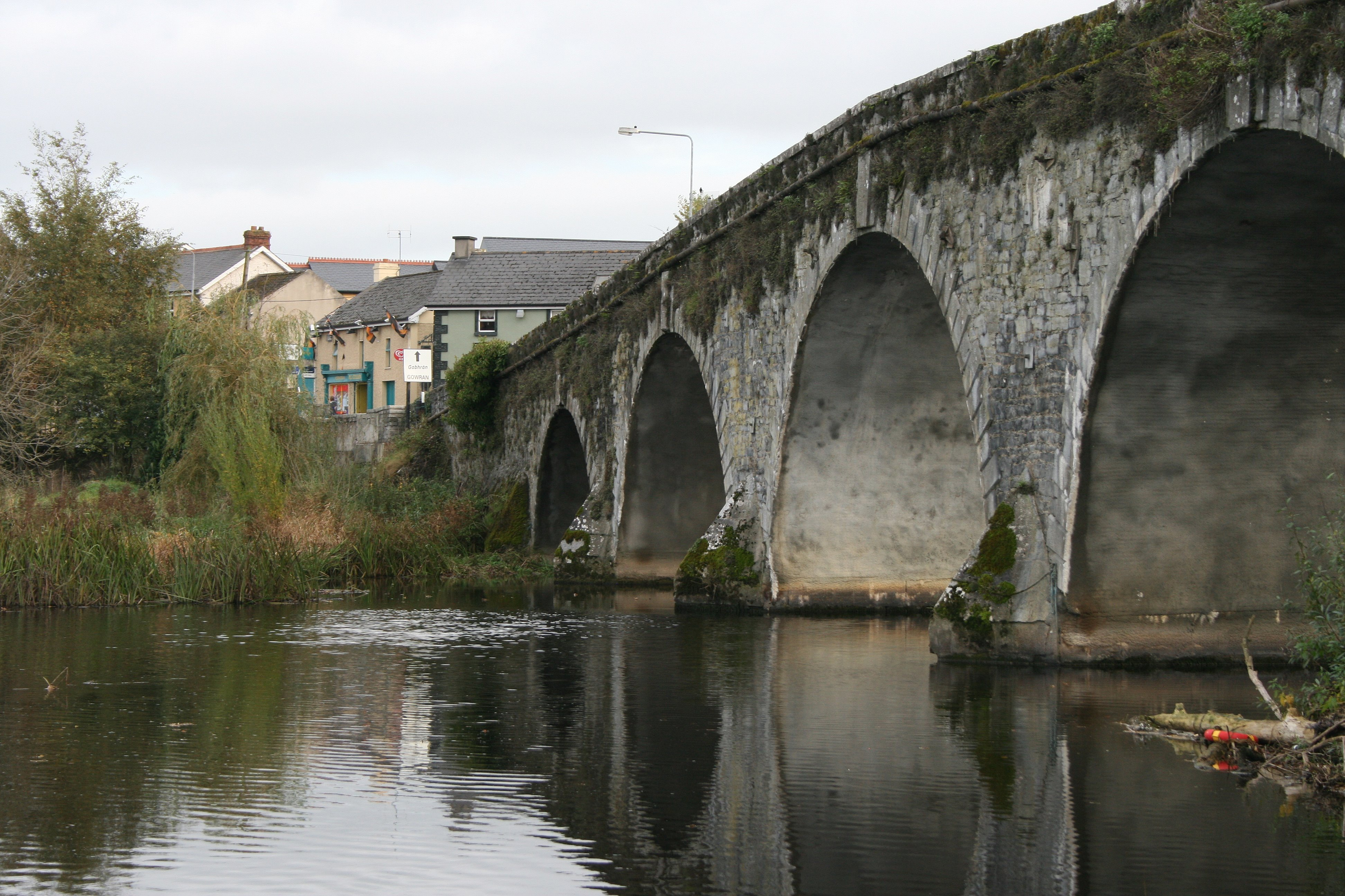 Bennetsbridge over the River Nore, County Kilkenny, Ireland